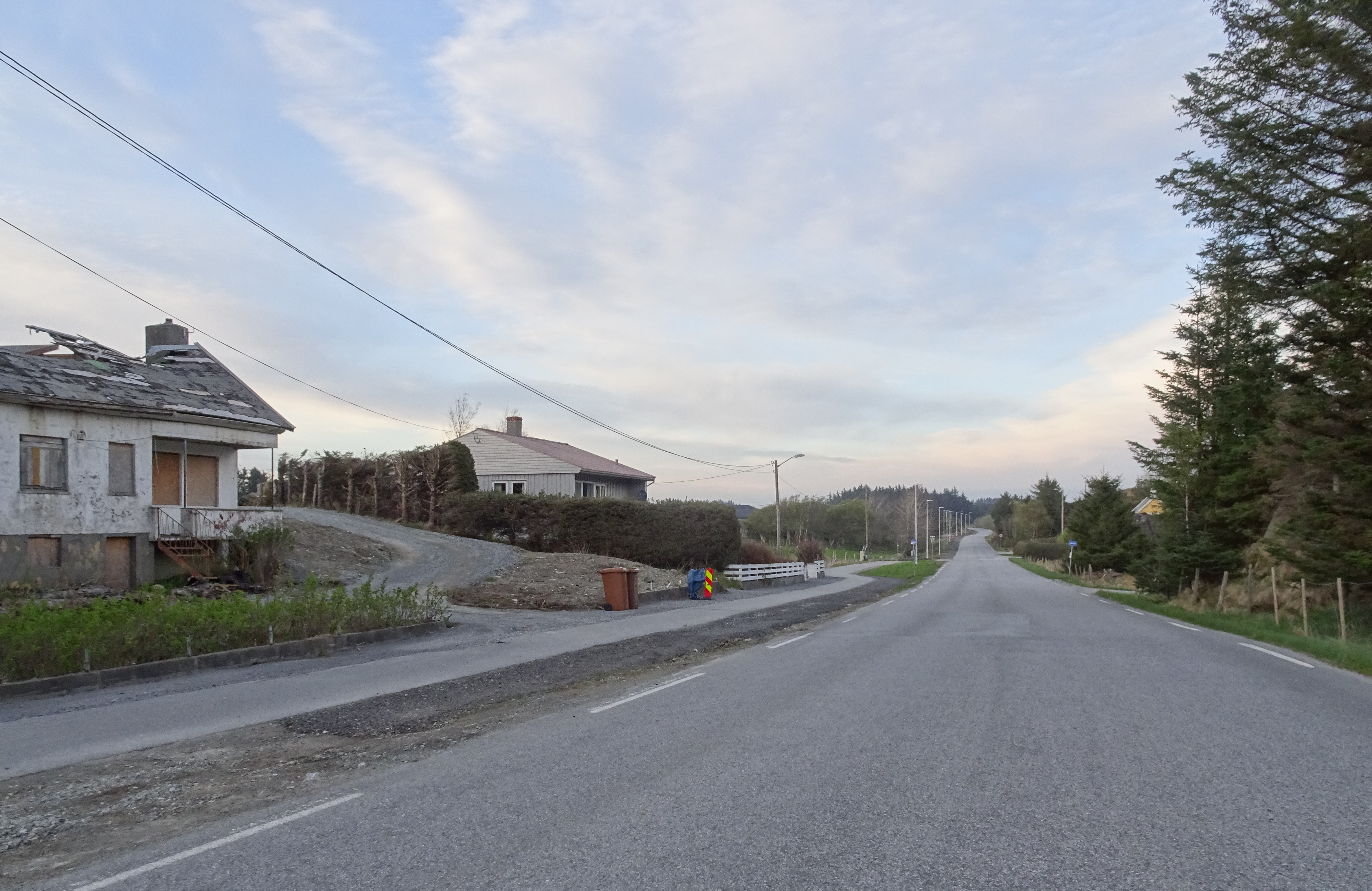 Vestre Veaveg (fylkesvei 854) på Karmøy